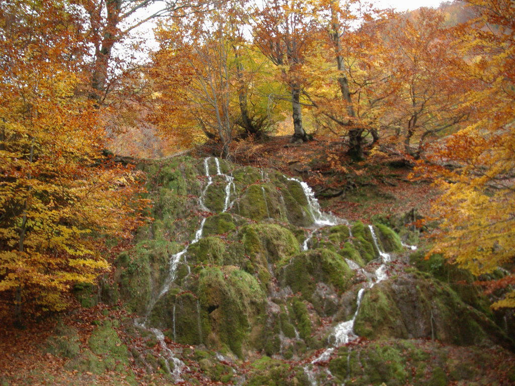 Izvor din comuna Sag